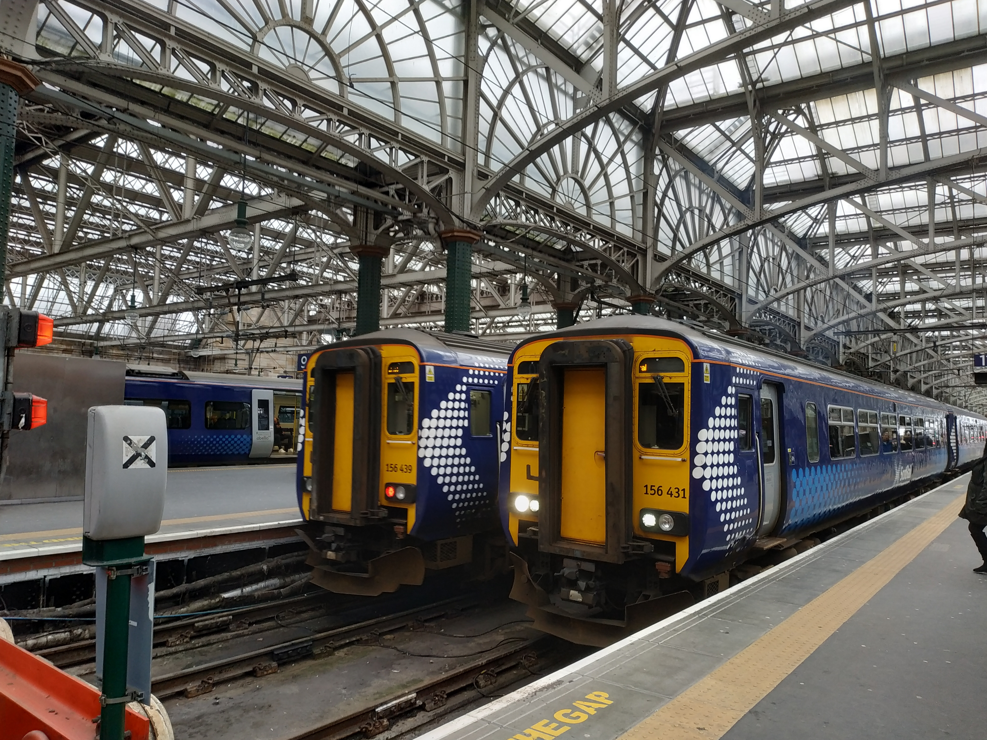 BR Class 156 ScotRail à la gare centrale de Glasgow